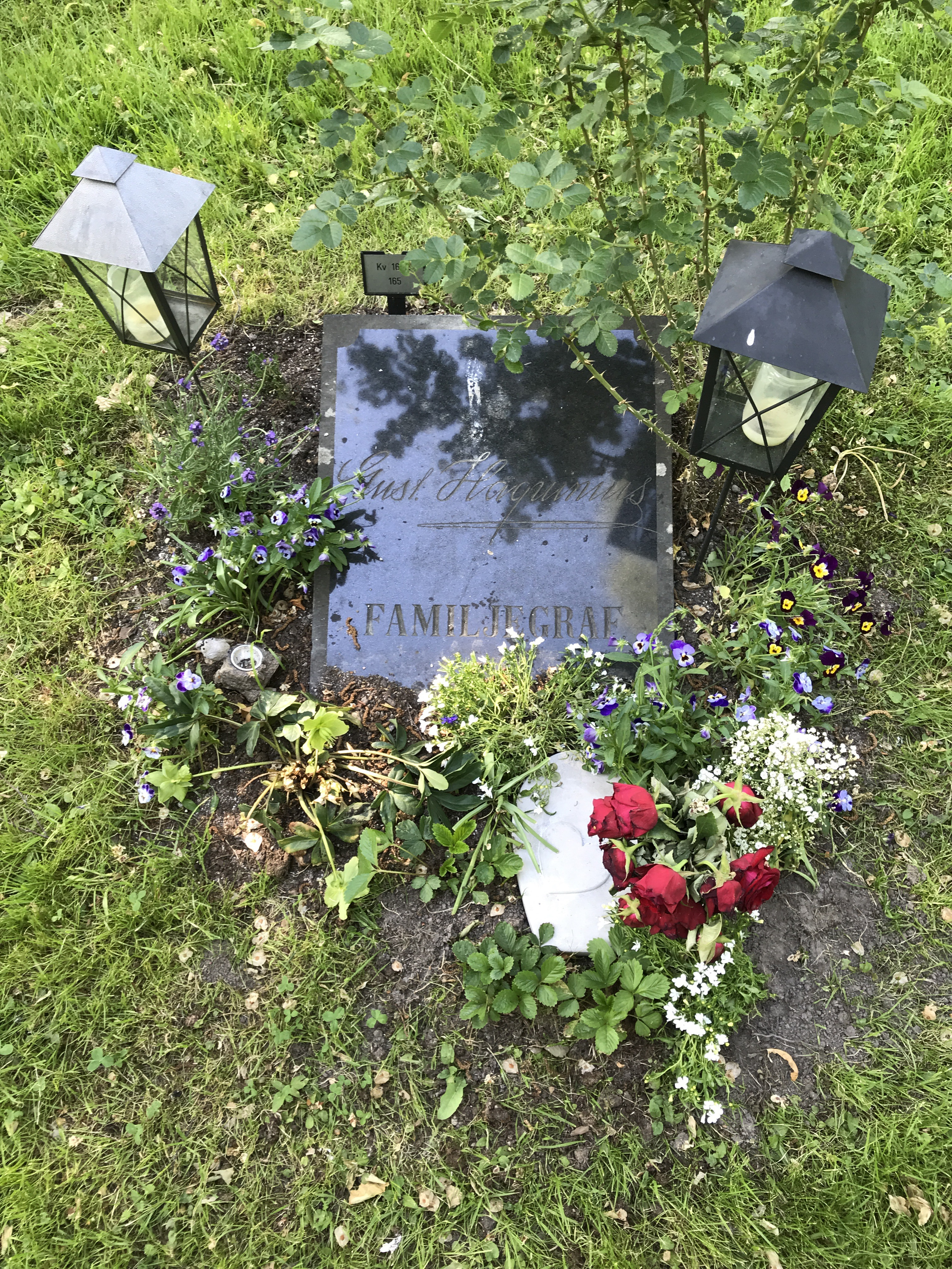 Grave 16B:00165